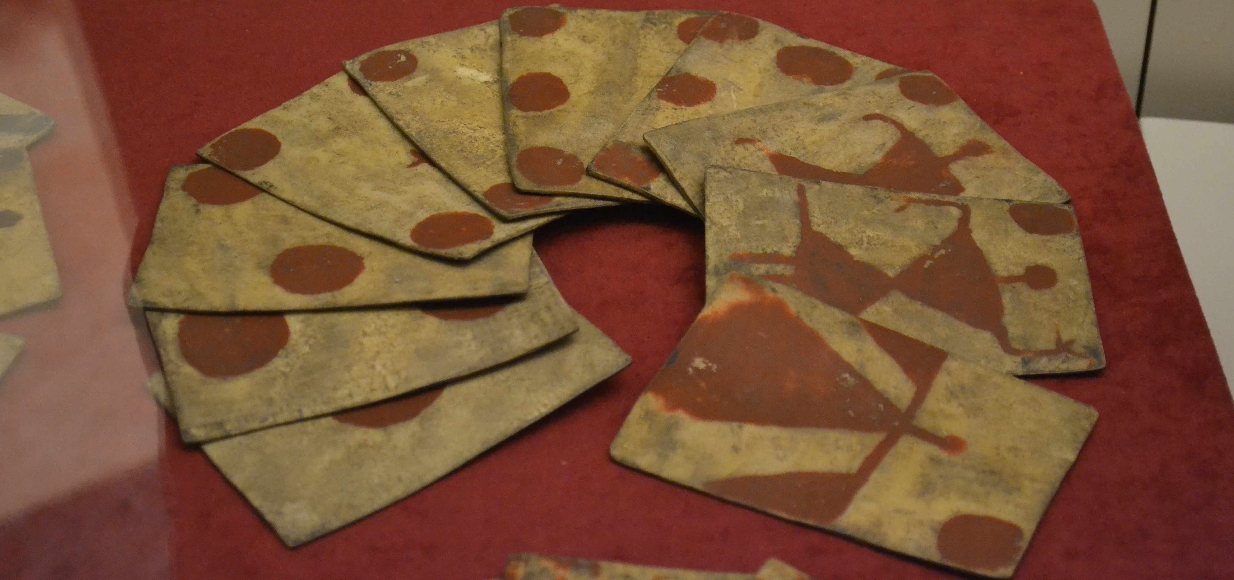 Baraja española de cuero de los indios mapuches. Se compone de 39 naipes y la usaban los varones indígenas de Chile. Siglso XVI-XVII. Números de inventario 13.638 a 13.676. Museo de América.